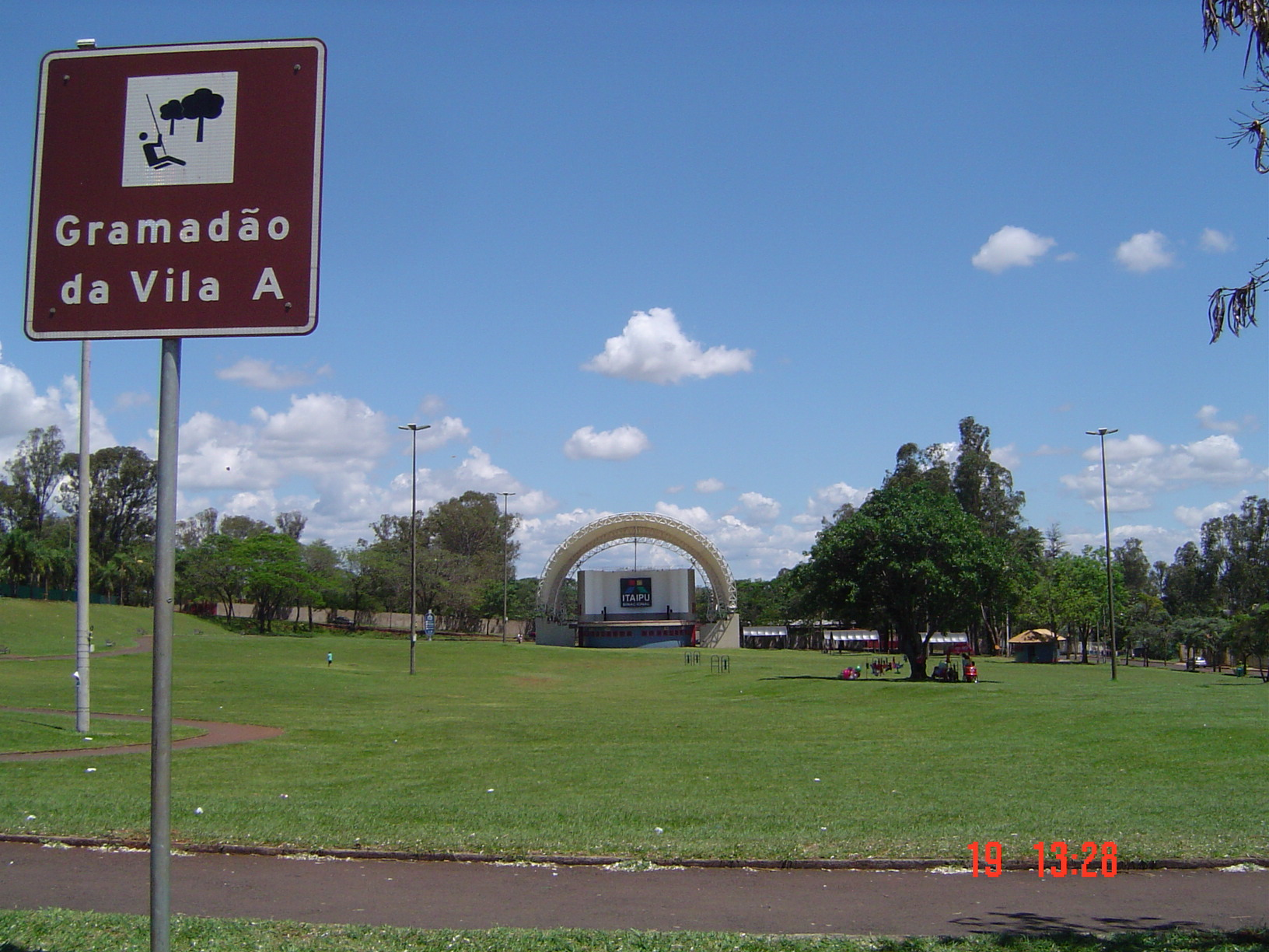 Vista do Gramadão da Vila A